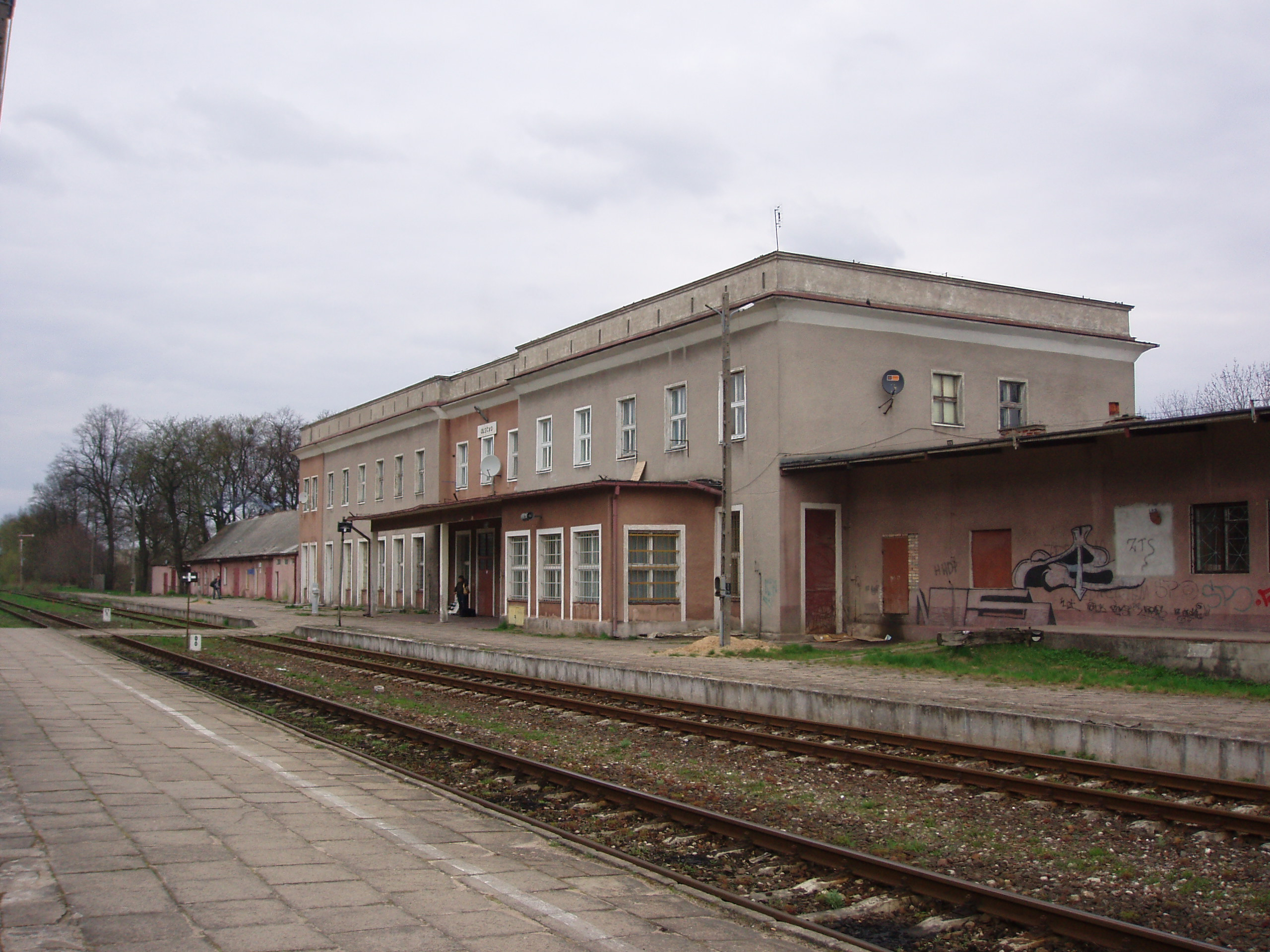 Olecko, dworzec PKP, widok od strony peronów